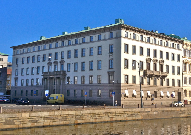 Hovrätten i Göteborg vid Packhusplatsen/Norra Hamngatan, tidigare huvudkontor för Broströmskoncernen